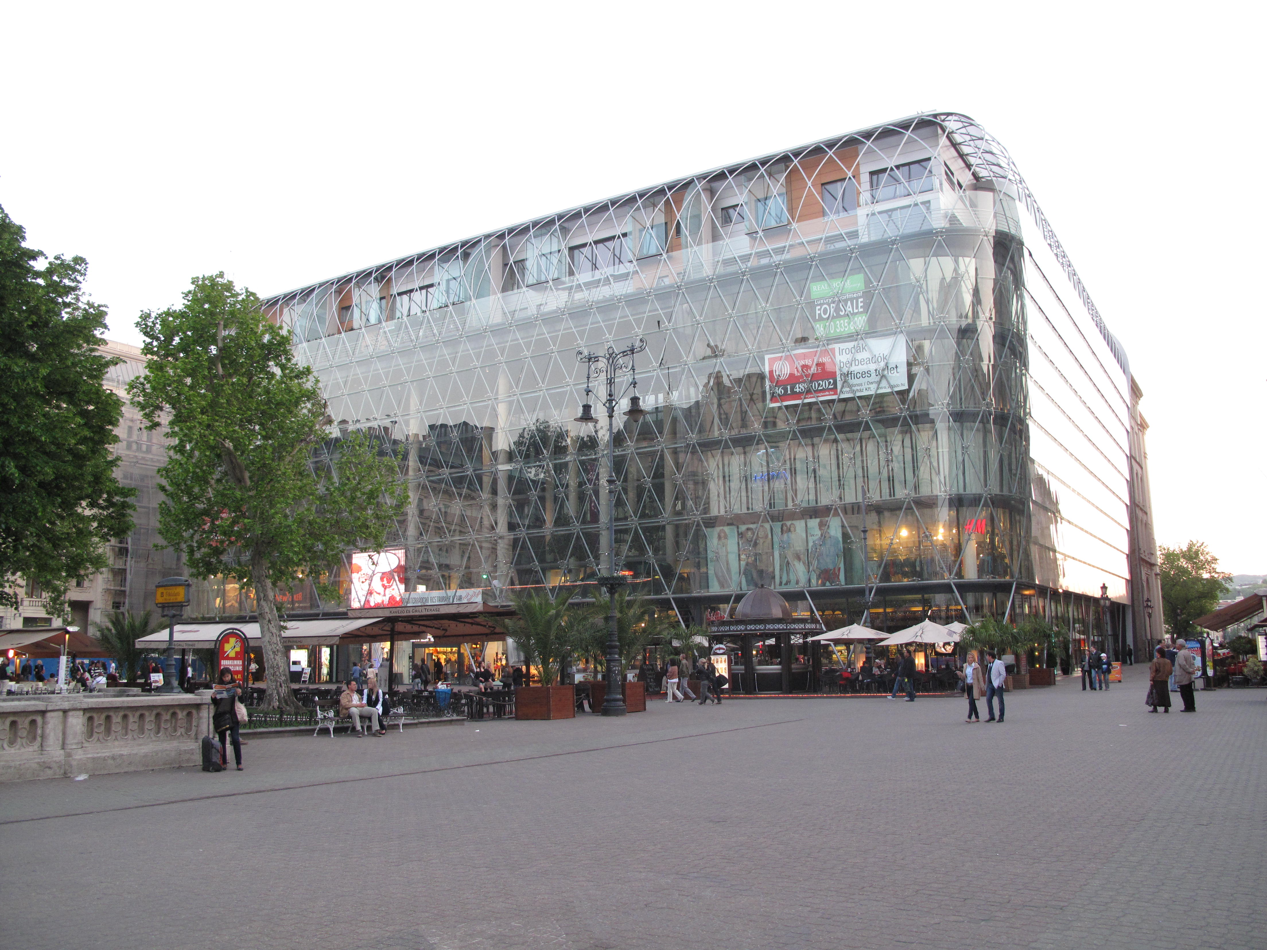 Budapešť